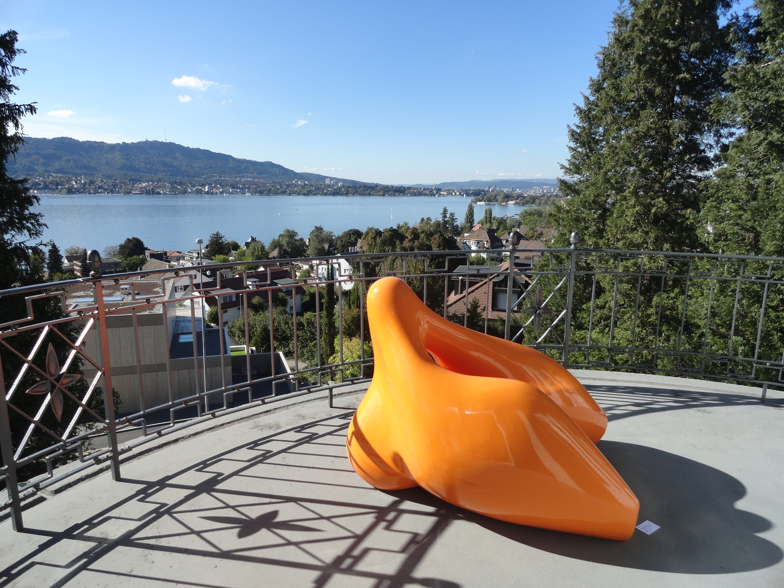 Balkon der Villa Meier-Severini in Zollikon, Sicht auf die Stadt Zürich